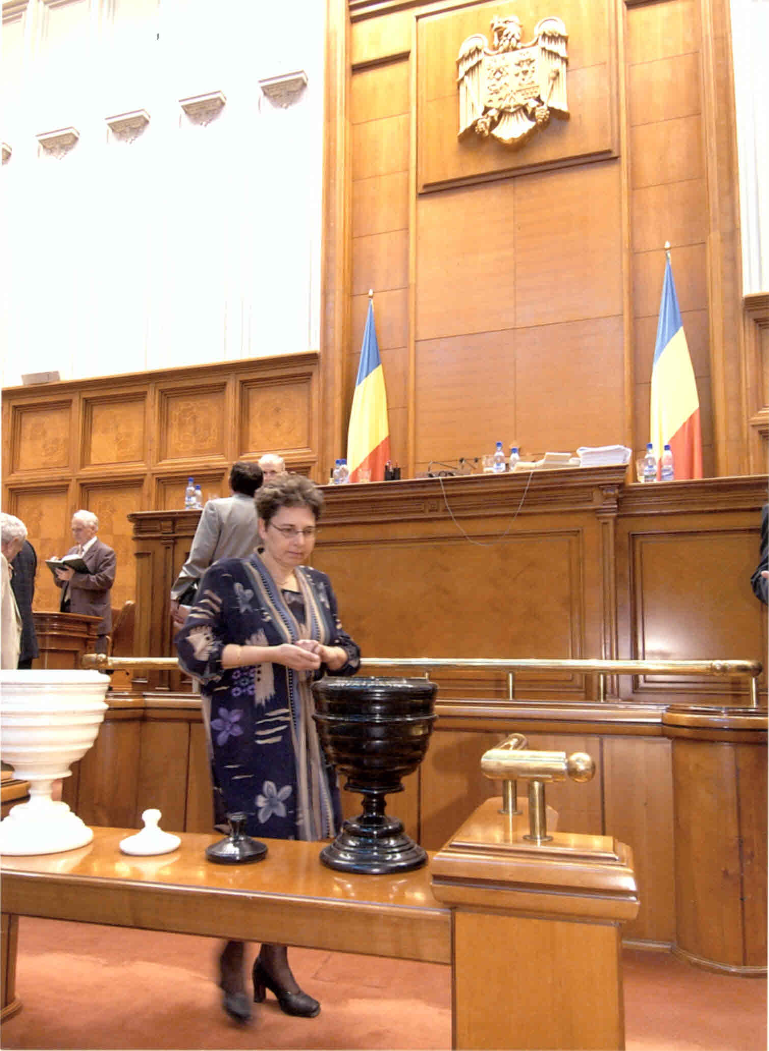 Parlamentul Romaniei